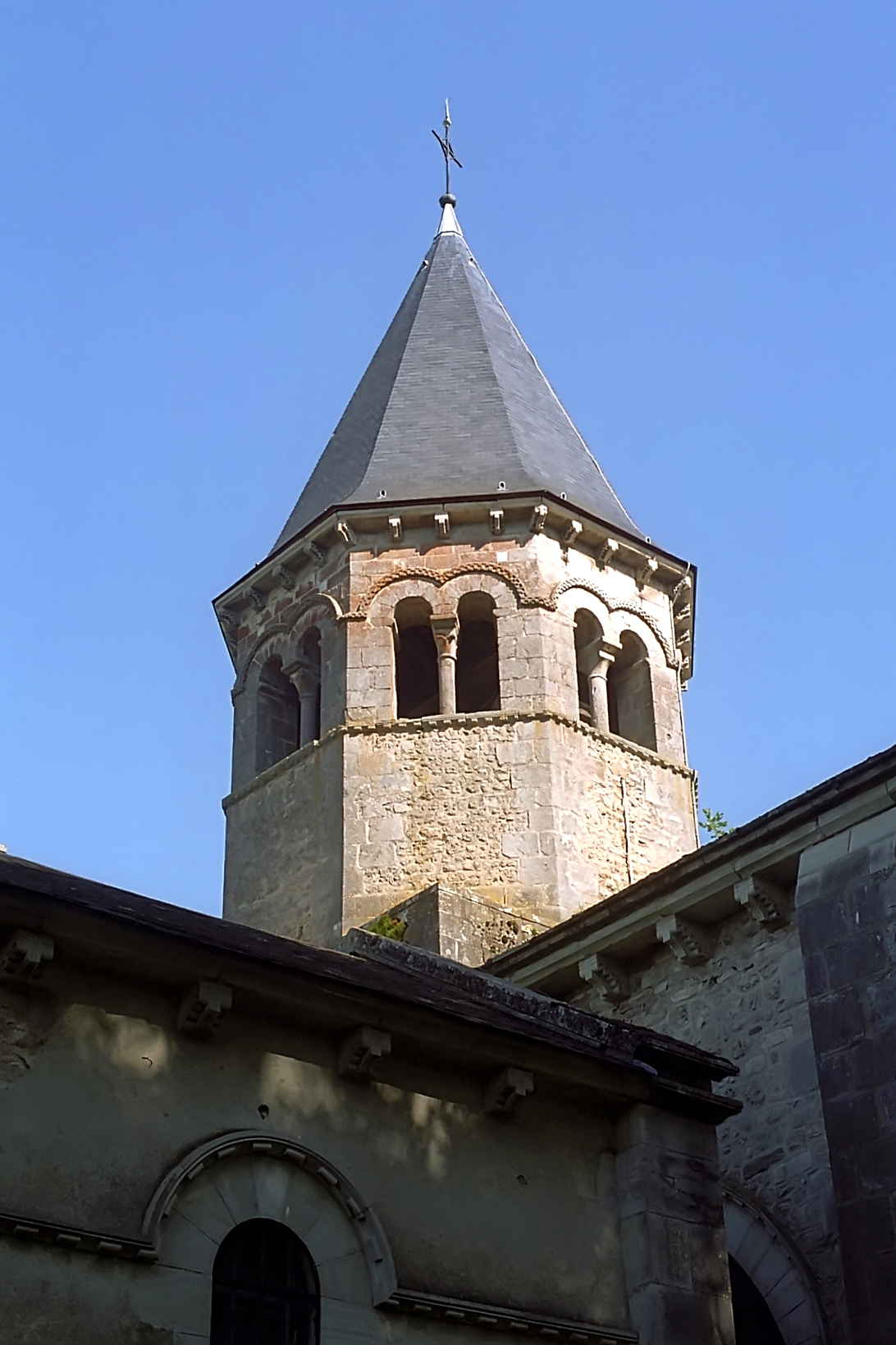 France - Allier - Église Saint-Symphorien de Biozat